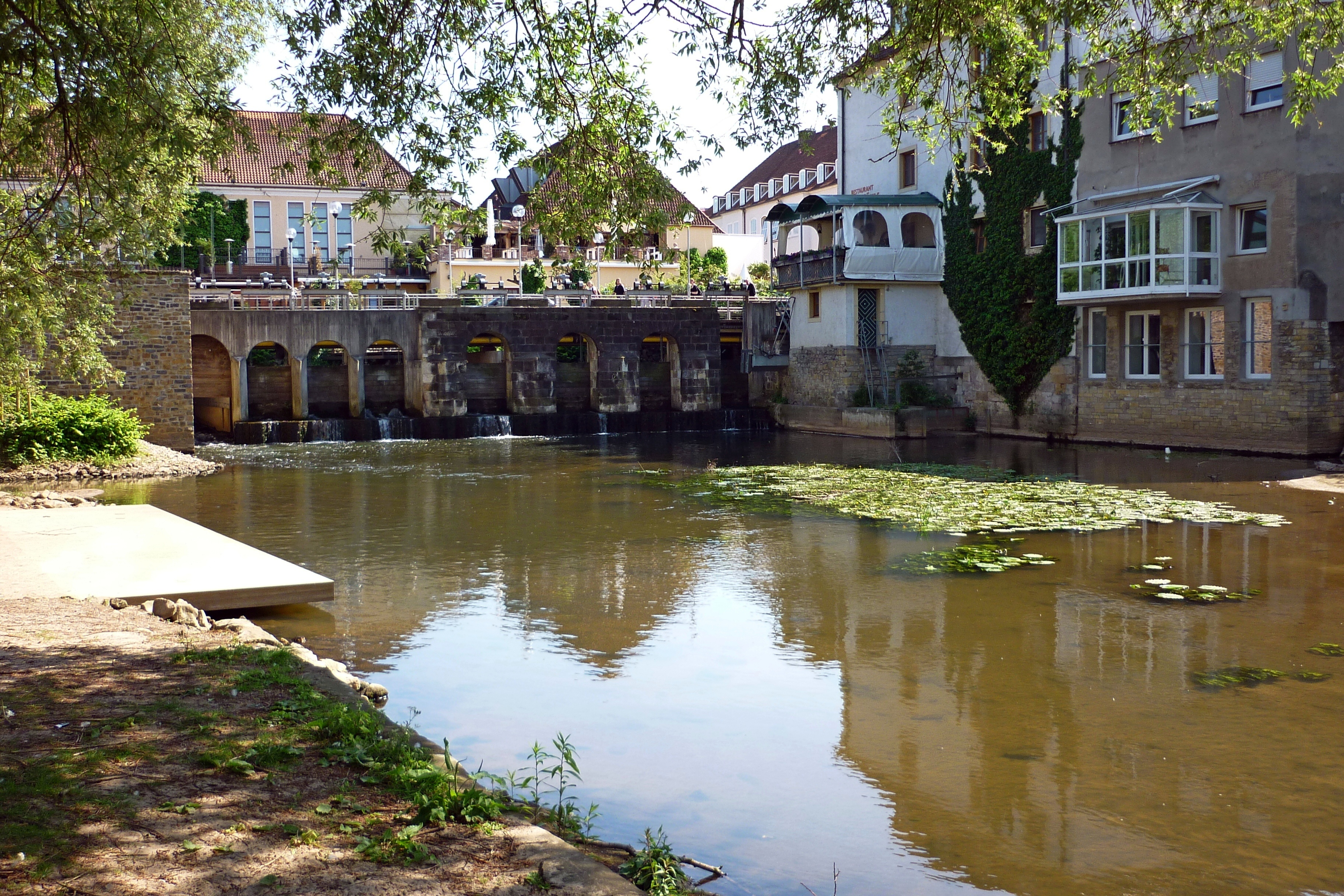 Osnabrück, das Hasewehr an der Heinrich-Heine-Straße nahe Hauptbahnhof.